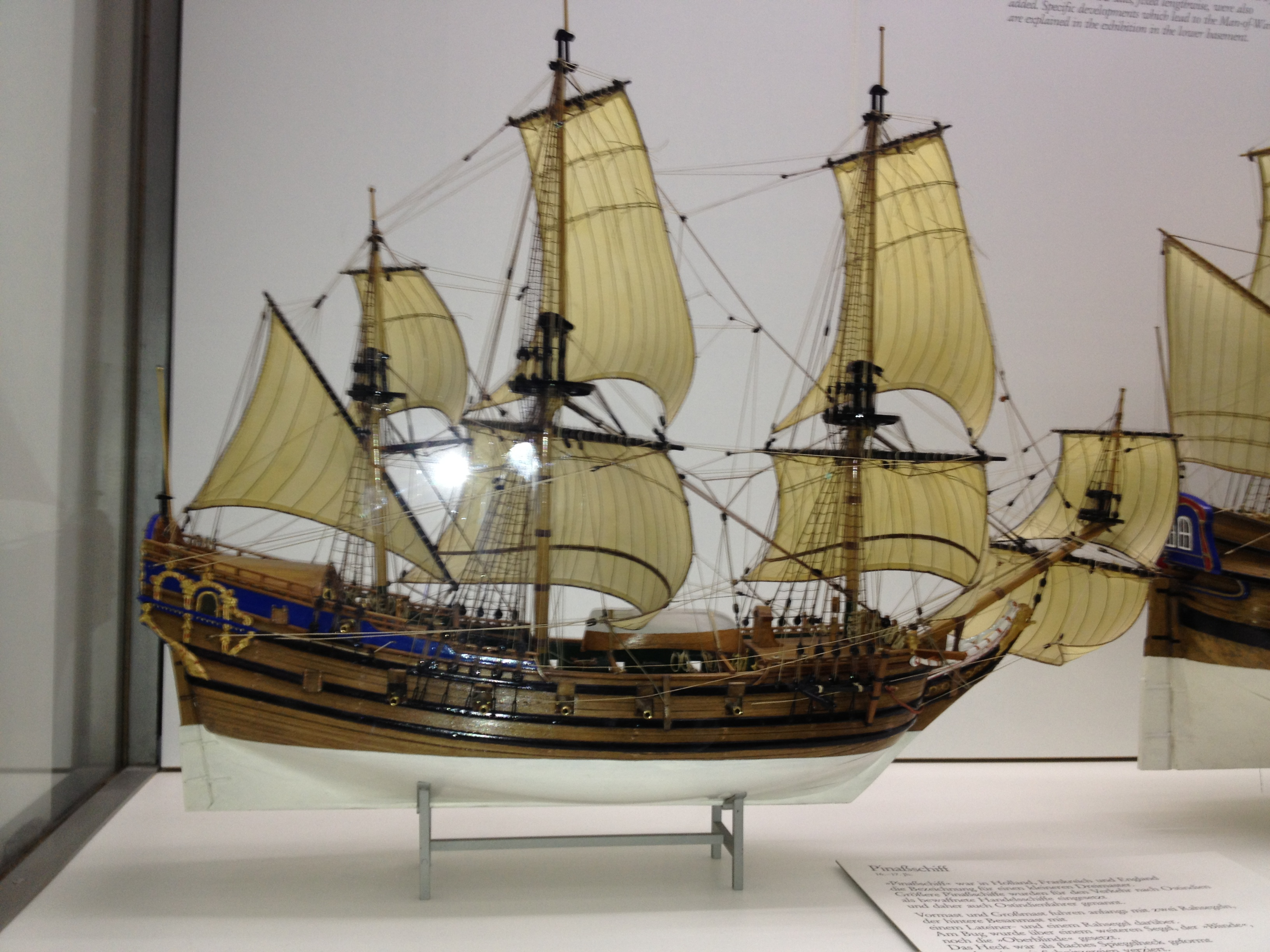 Modell eines Pinaßschiffs später Bauart (ca. 1700) im Detutschen Museum in München